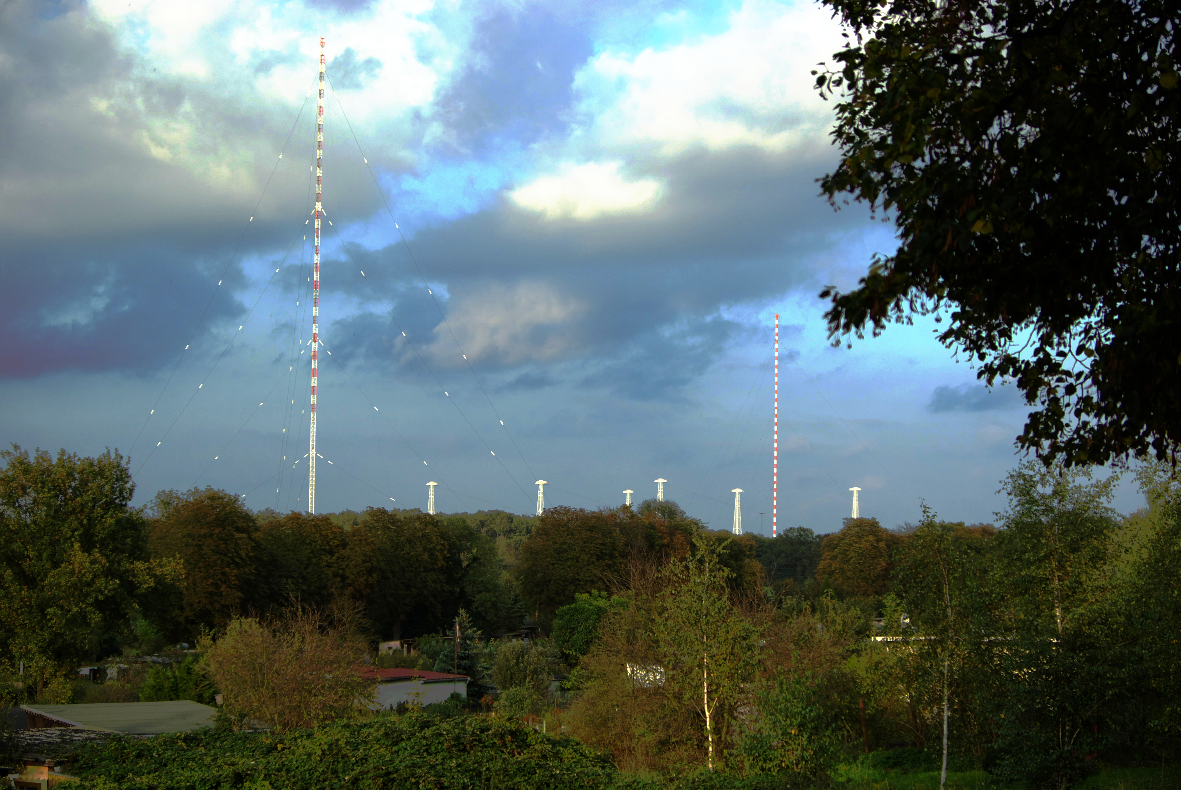 Sendeanlagen Burg bei Magdeburg